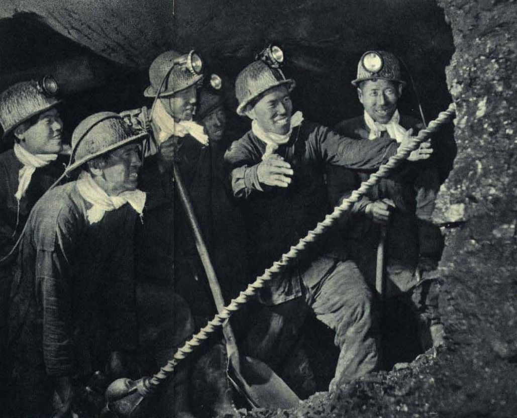 1962-01 1962年 河北井径煤矿打眼